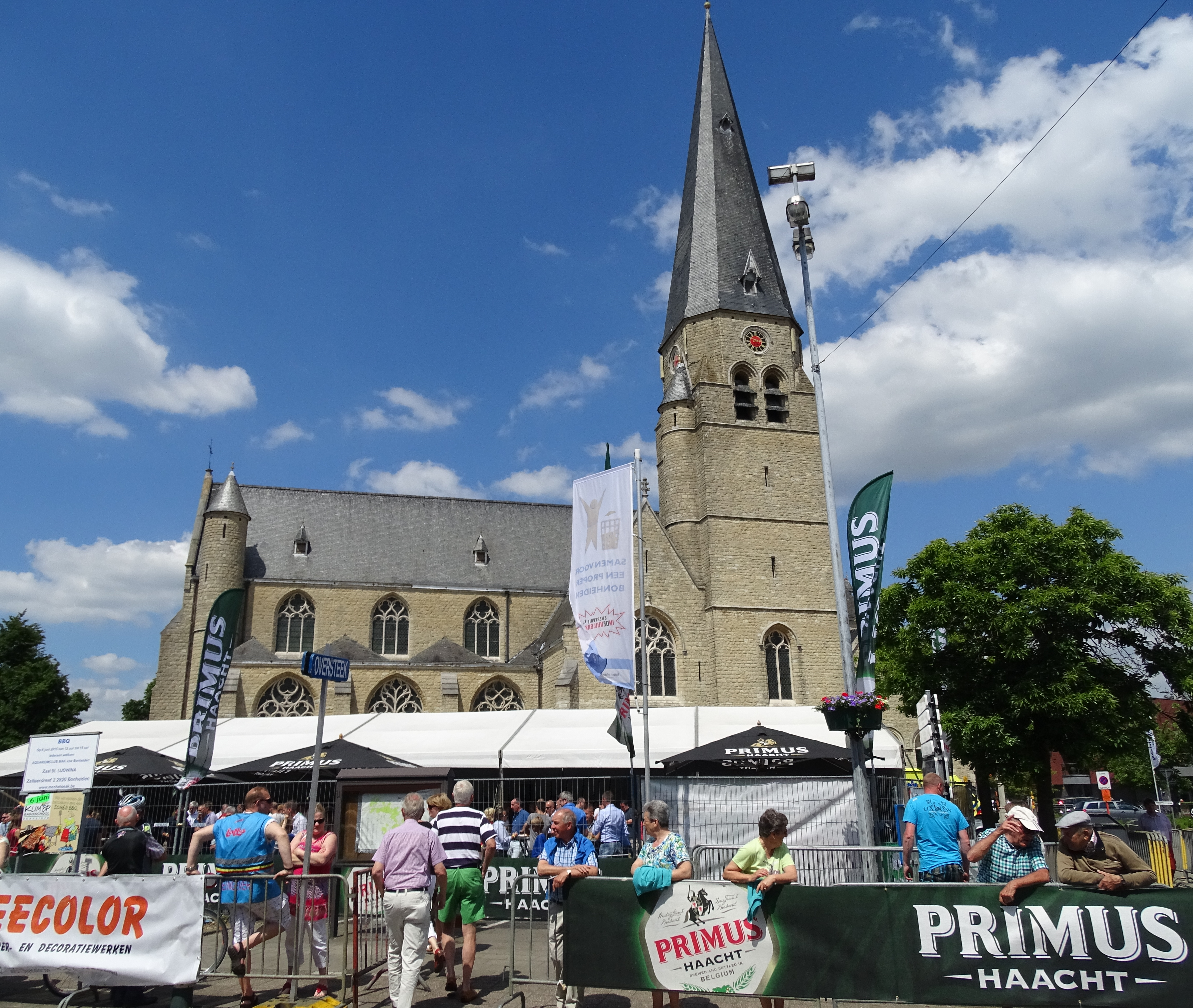 Reportage réalisé le dimanche 7 juin à l'occasion de l'arrivée du Mémorial Philippe Van Coningsloo 2015 à Bonheiden, Belgique.